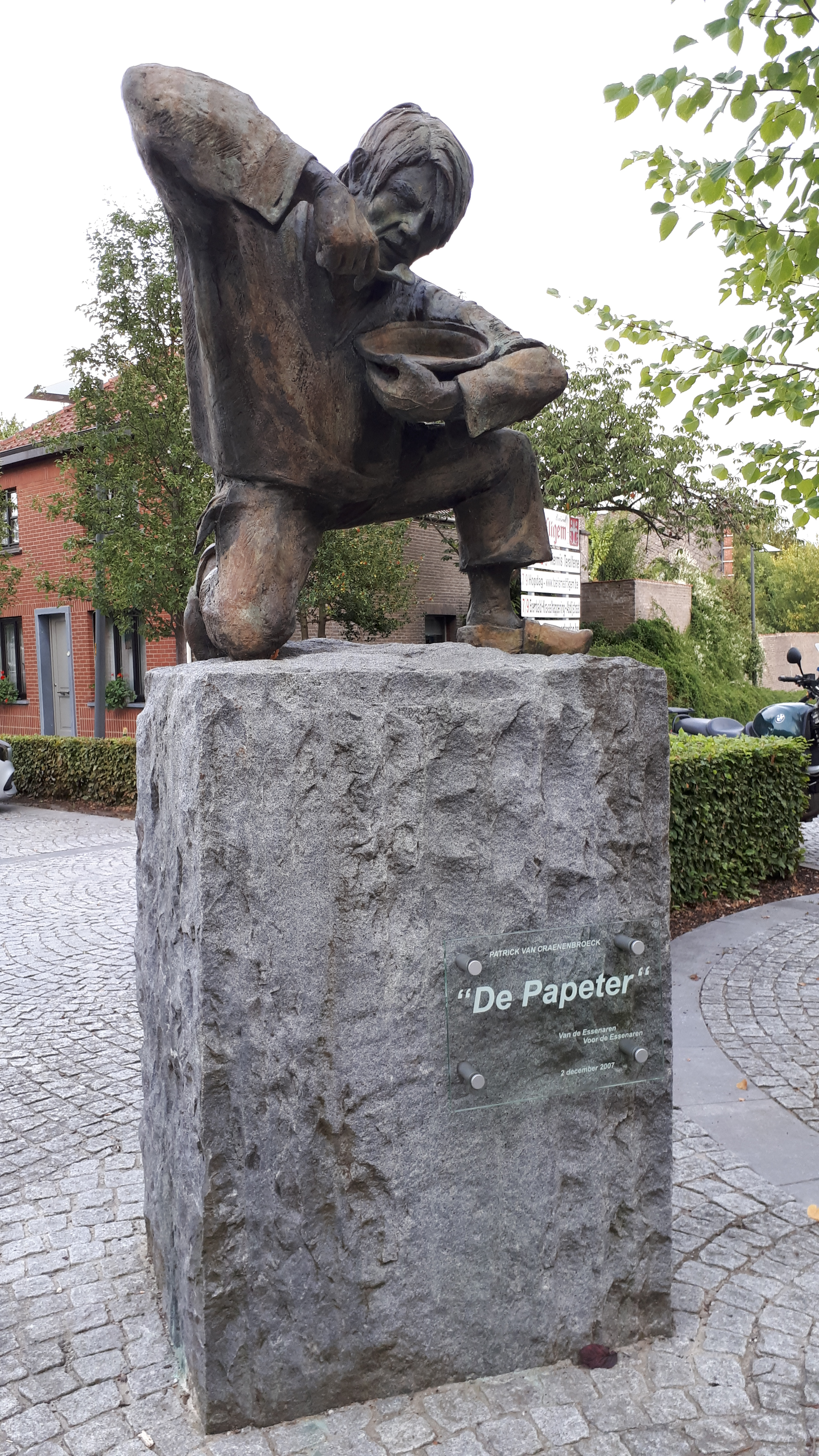 De Papeter Van de Essenaren Voor de Essenaren 2 december 2007 This photo of immovable heritage has been taken in the Flemish Region